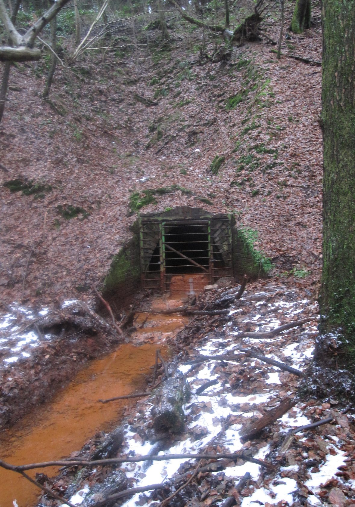 Mundloch der aufgelassenen Grube Penny in Neunkirchen-Seelscheid, nahe Ortsteil Mohlscheid